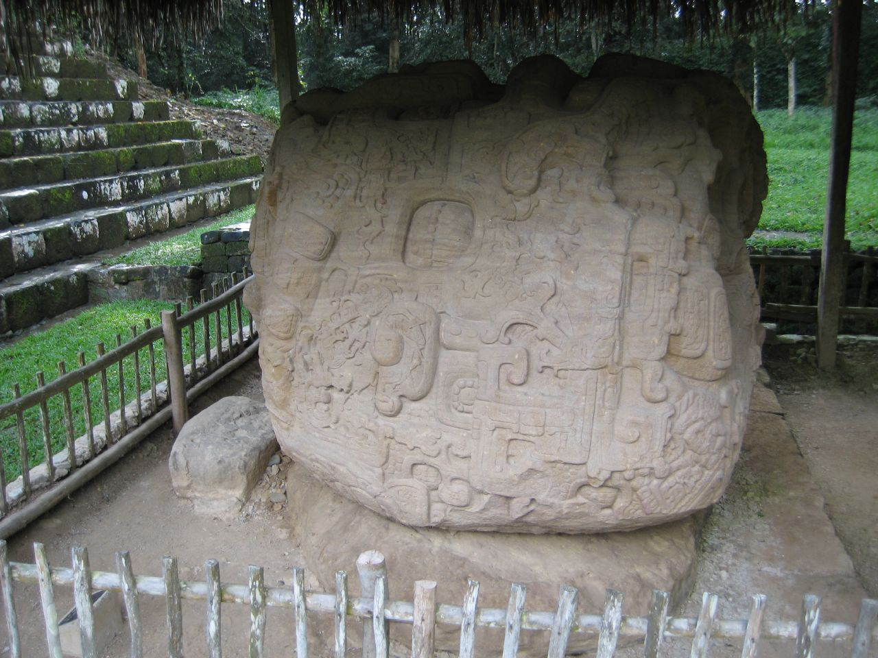 Quirigua. Zoomorph P